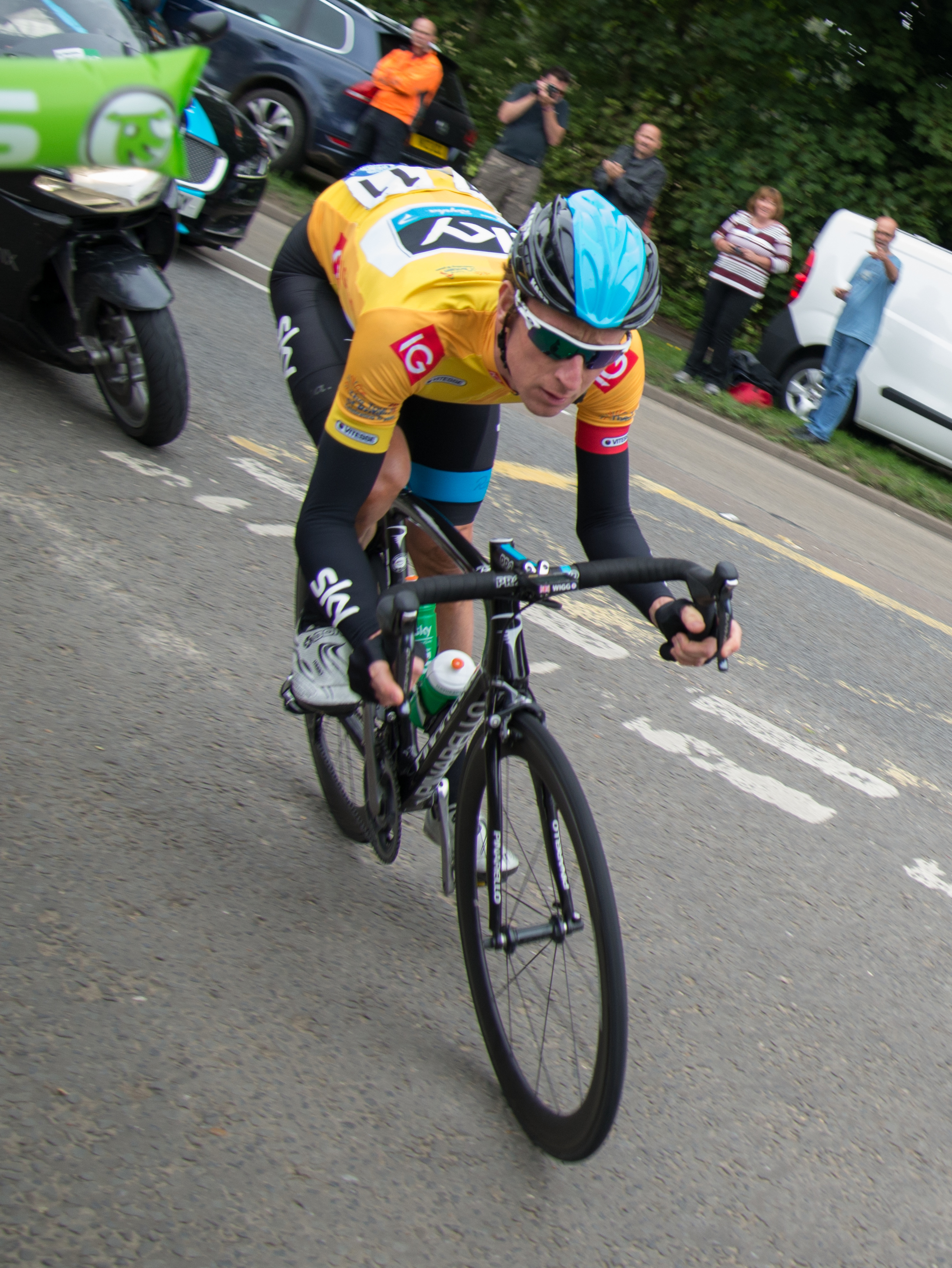 During stage 7.